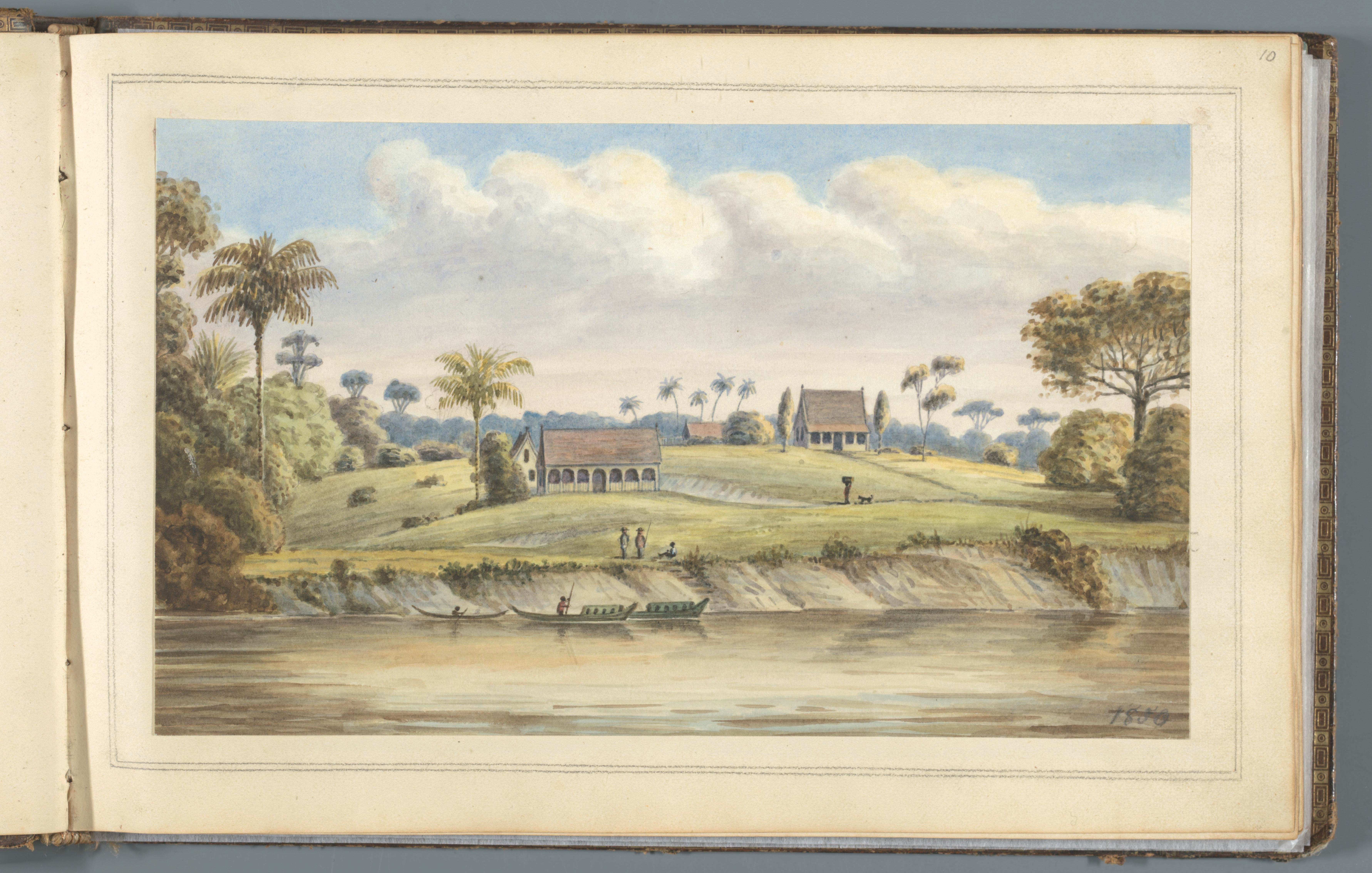 IdentificatieTitel(s): Gezicht op Port Victoria gelegen aan de Suriname rivierPort Victoria- Boven-Suriname (titel op object)Album met tekeningen van Suriname, p.10 (50) (serietitel)Objecttype: albumblad topografische tekening aquarel Objectnummer: RP-T-1994-281-10Opschriften / Merken: signatuur en datum: ‘gedateerd recto r.o.:1859’inscriptie: ‘.’VervaardigingVervaardiger: tekenaar: Jacob Marius Adriaan Martini van GeffenPlaats vervaardiging: Boven-SurinameDatering: 1850Fysieke kenmerken: aquarel, gewassen inkt, potloodMateriaal: papier waterverf potlood inkt Techniek: penseelAfmetingen: album: h 170 mm × b 260 mm × d 20 mmOnderwerpWaar: Boven-SurinamePort VictoriaVerwerving en rechtenVerwerving: aankoop 1994Copyright: Publiek domein